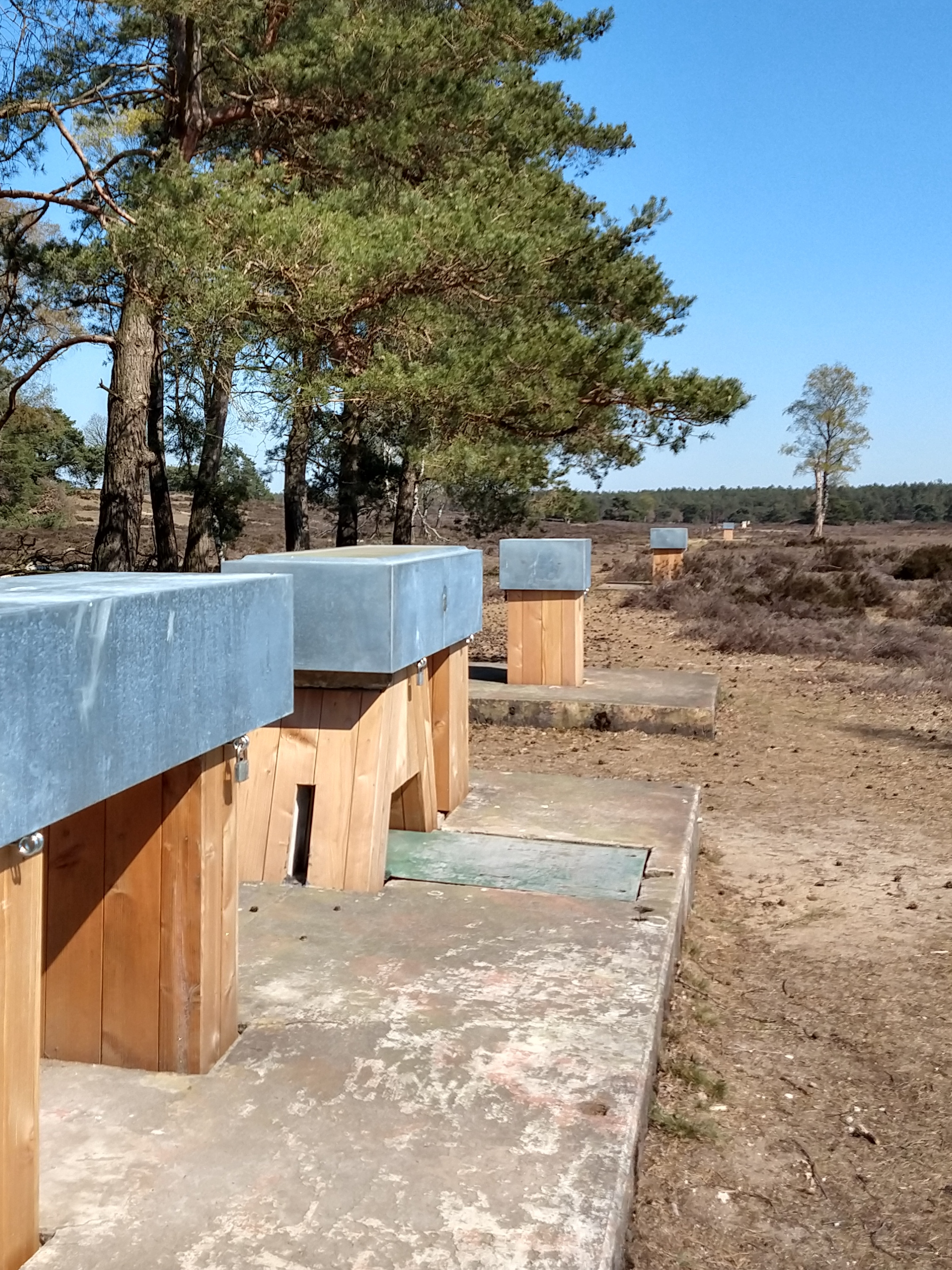 Westelijk eind van de ijkbasis na de restauratie begin 2019